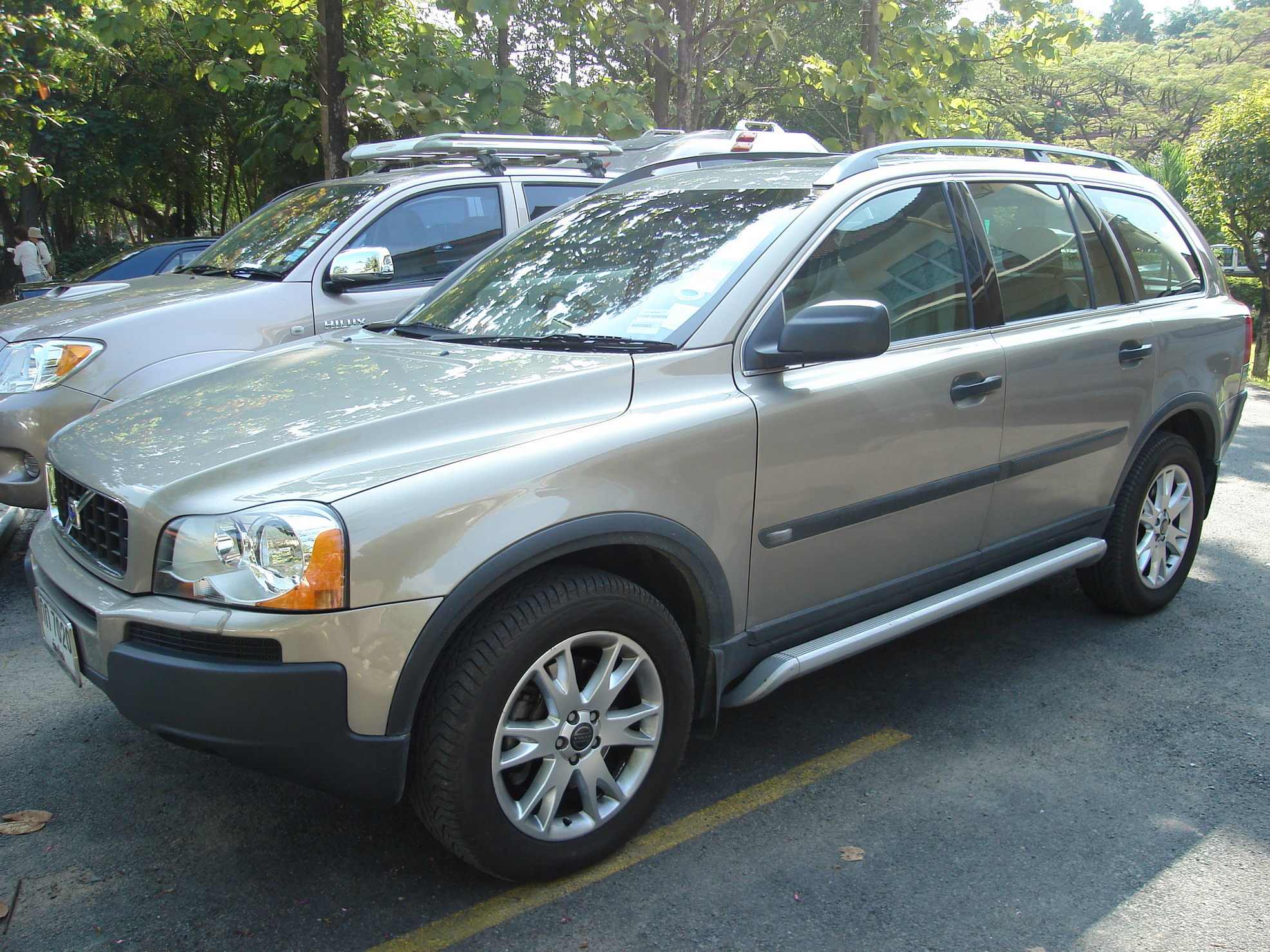 Volvo XC90